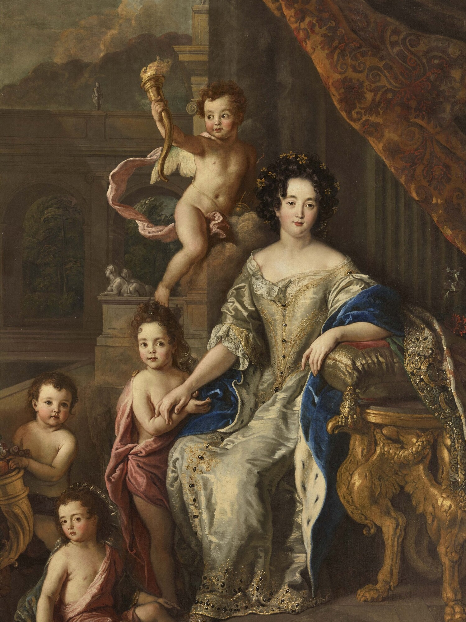 Portraits présumés de Madame de Montespan entourée de ses quatre premiers enfants légitimés, en 1677